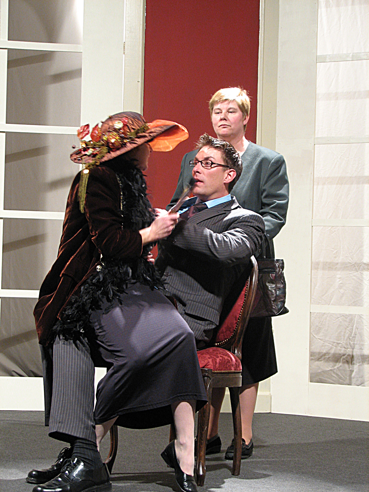 Madame Pernelle, neben ihrem Sohn Orgon die einzige, die auf Tartuffes scheinheiliges Getue hereinfällt, tyrannisiert alle im Hause Orgon mit ihrer Bigotterie und Uneinsichtigkeit. (Szenenfoto des Exil Theaters aus Molières Reimkomödie "Le Tartuffe", 1. Akt, 1. Szene)